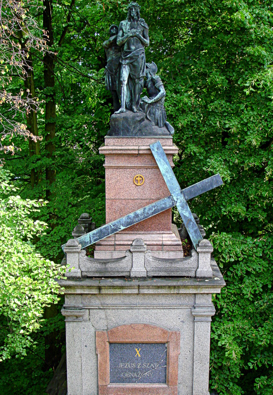 Zespół klasztorny oo. Paulinów: Kościół pw. Wniebowzięcia NMP i Znalezienia Krzyża Św. z kaplicami, zakrystią, skarbcem, wieżą, klasztorem, zabudowaniami gospodarczymi, arsenałem, drukarnią, domem muzykantów, twierdzą z bramami i bastionami, park Częstochowa, Częstochowa 02.1978.